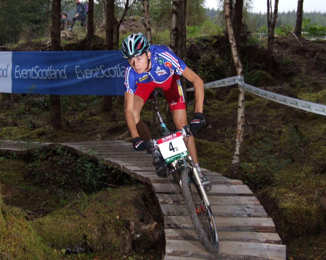 Stéphane Tempier